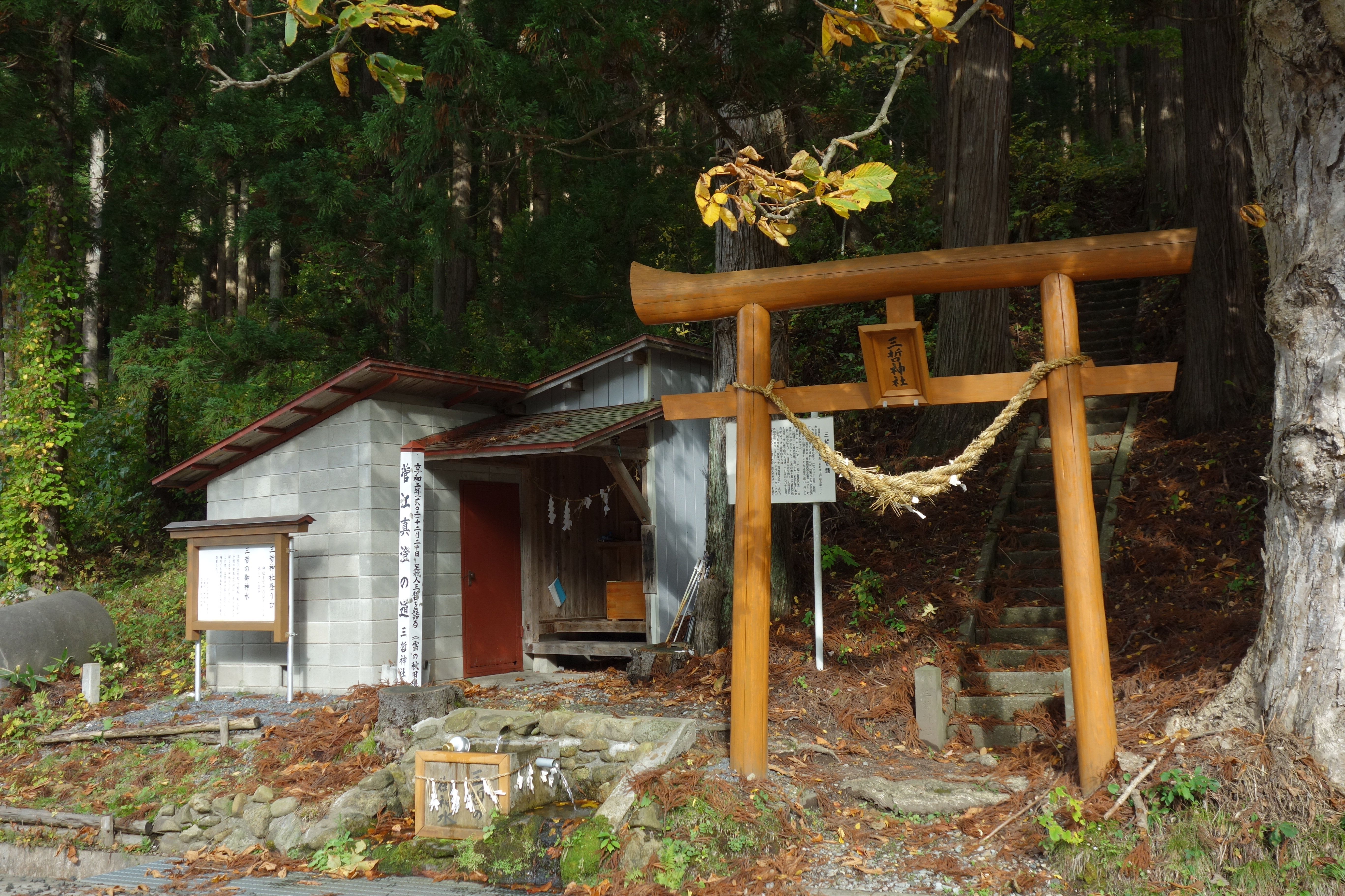 三哲山の麓にある三哲神社遙拝所